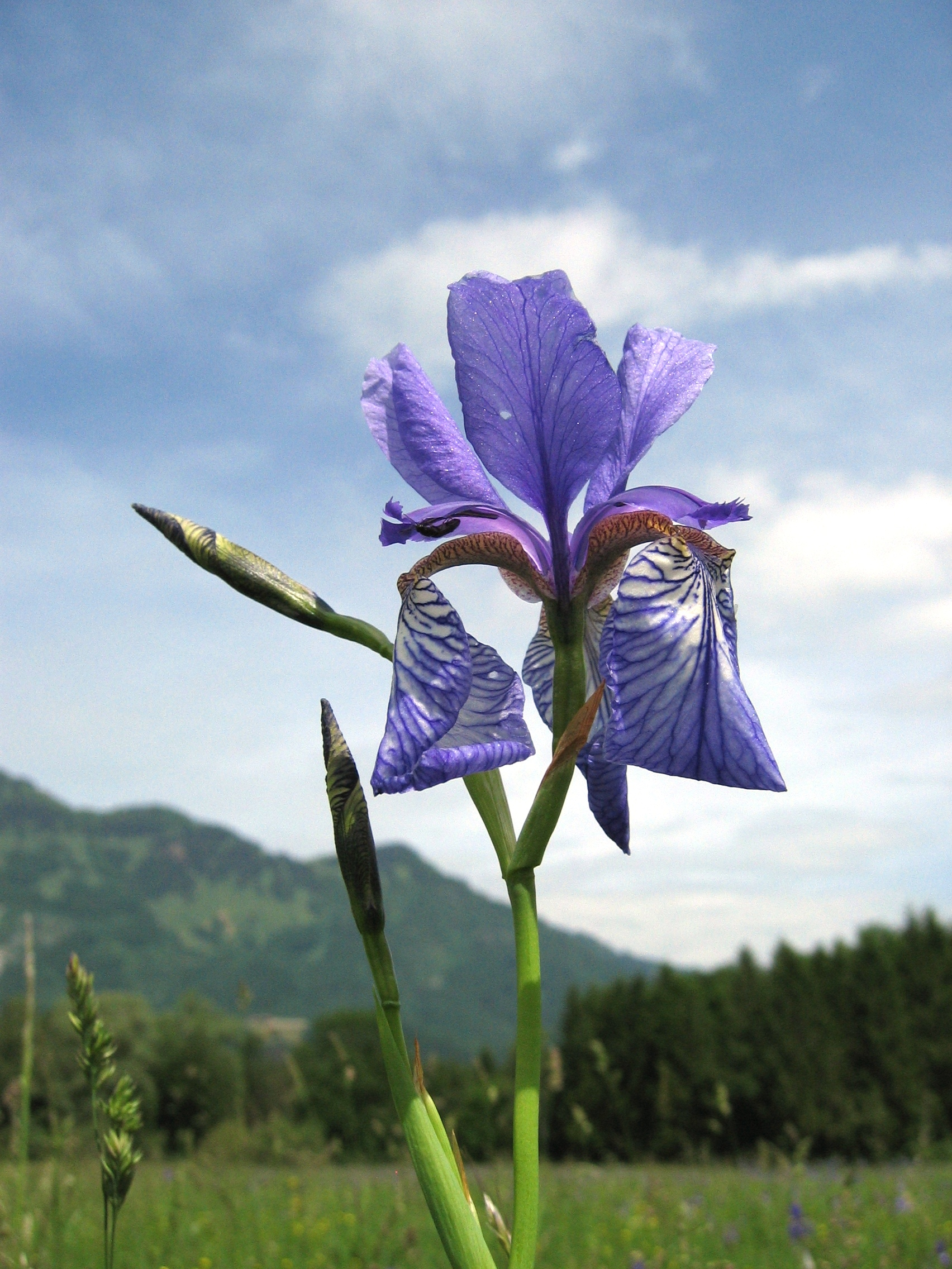 Bangs, Bangser Feld, Iris, Sibirische Schwertlilie, auch "Fläadrmüüs" (Fledermäuse) genannt